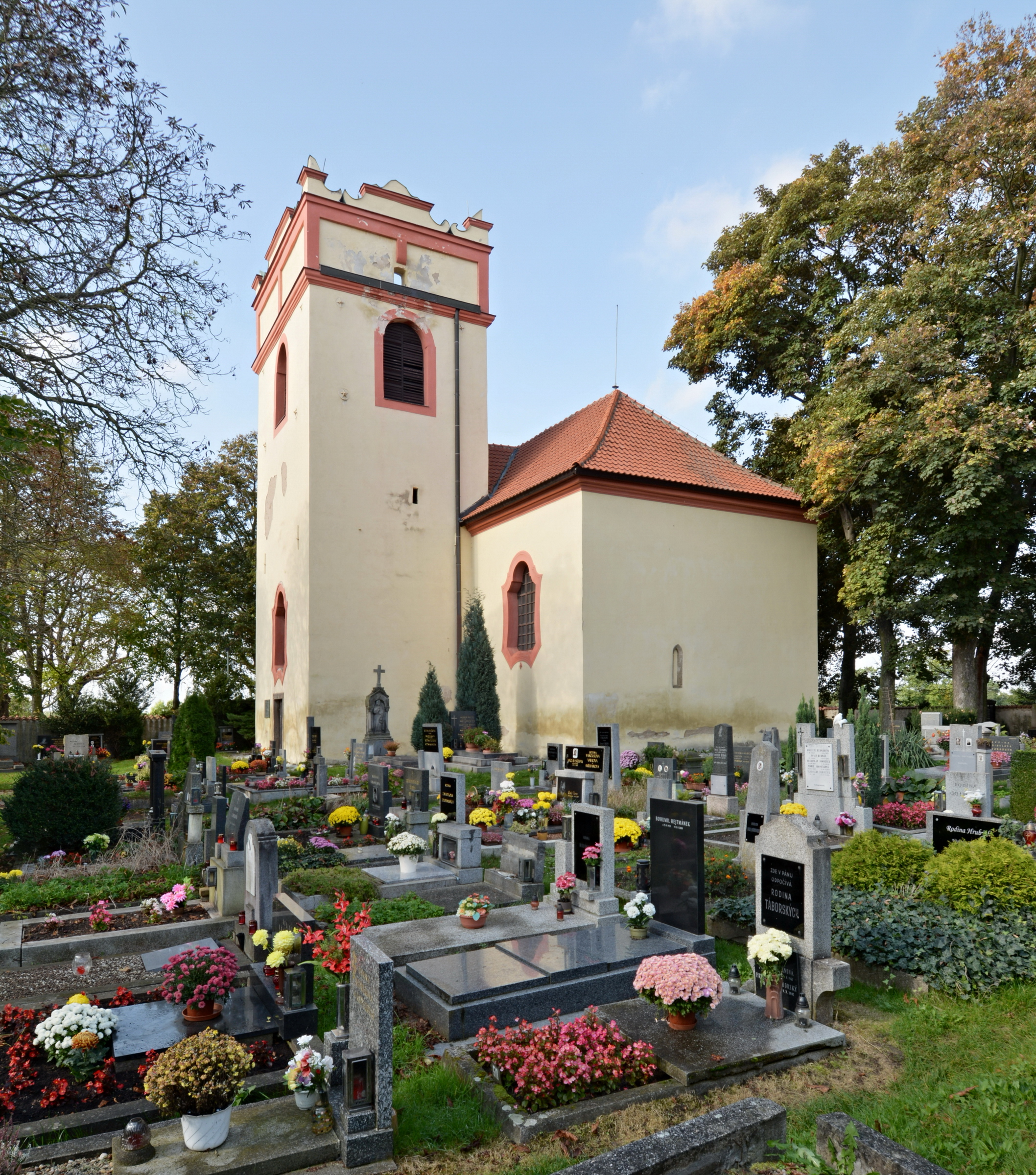 Kostel svaté Markéty, Praha Královice, pohled od východojihovýchodu.